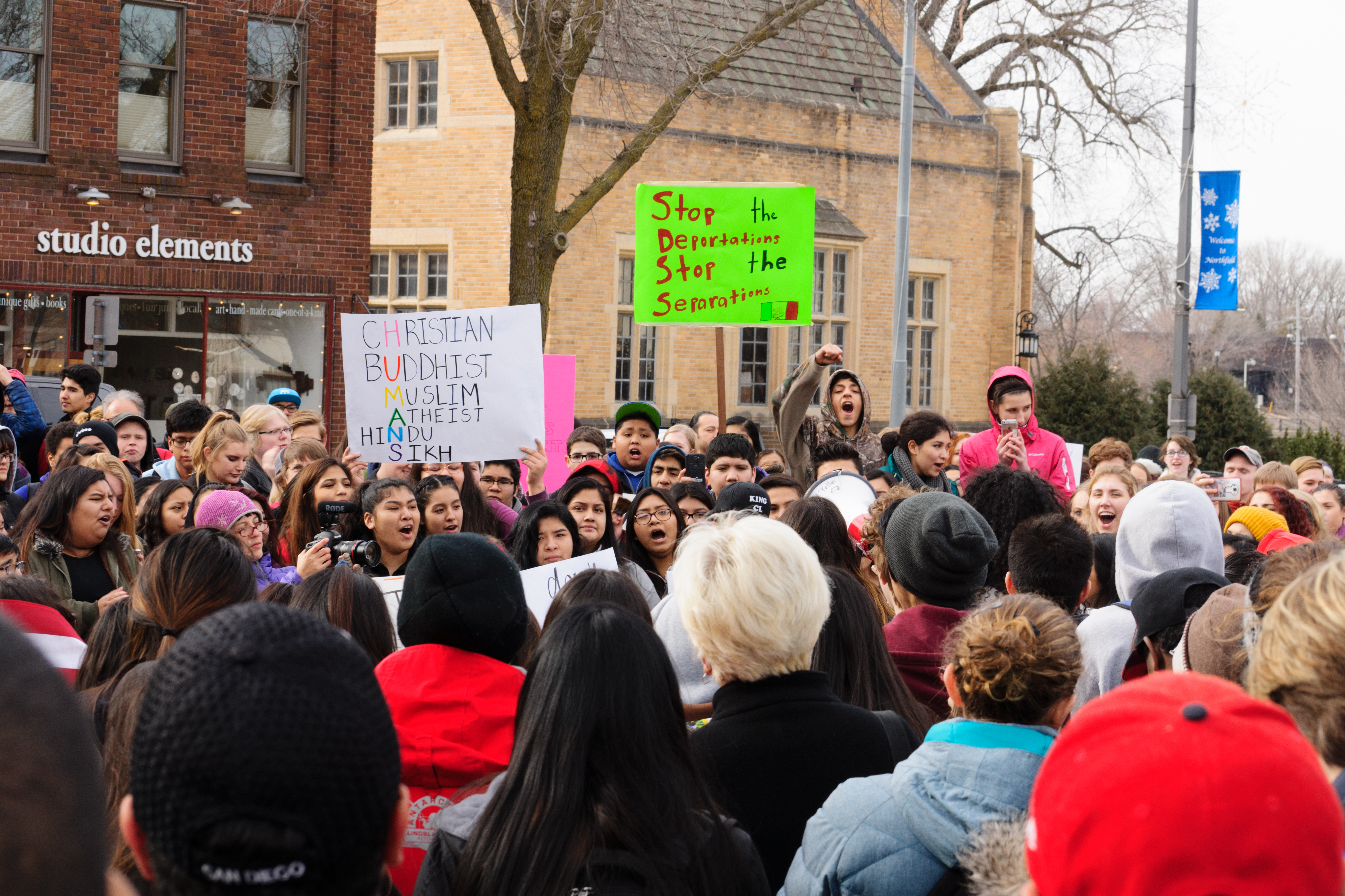 20170216-0025.jpg